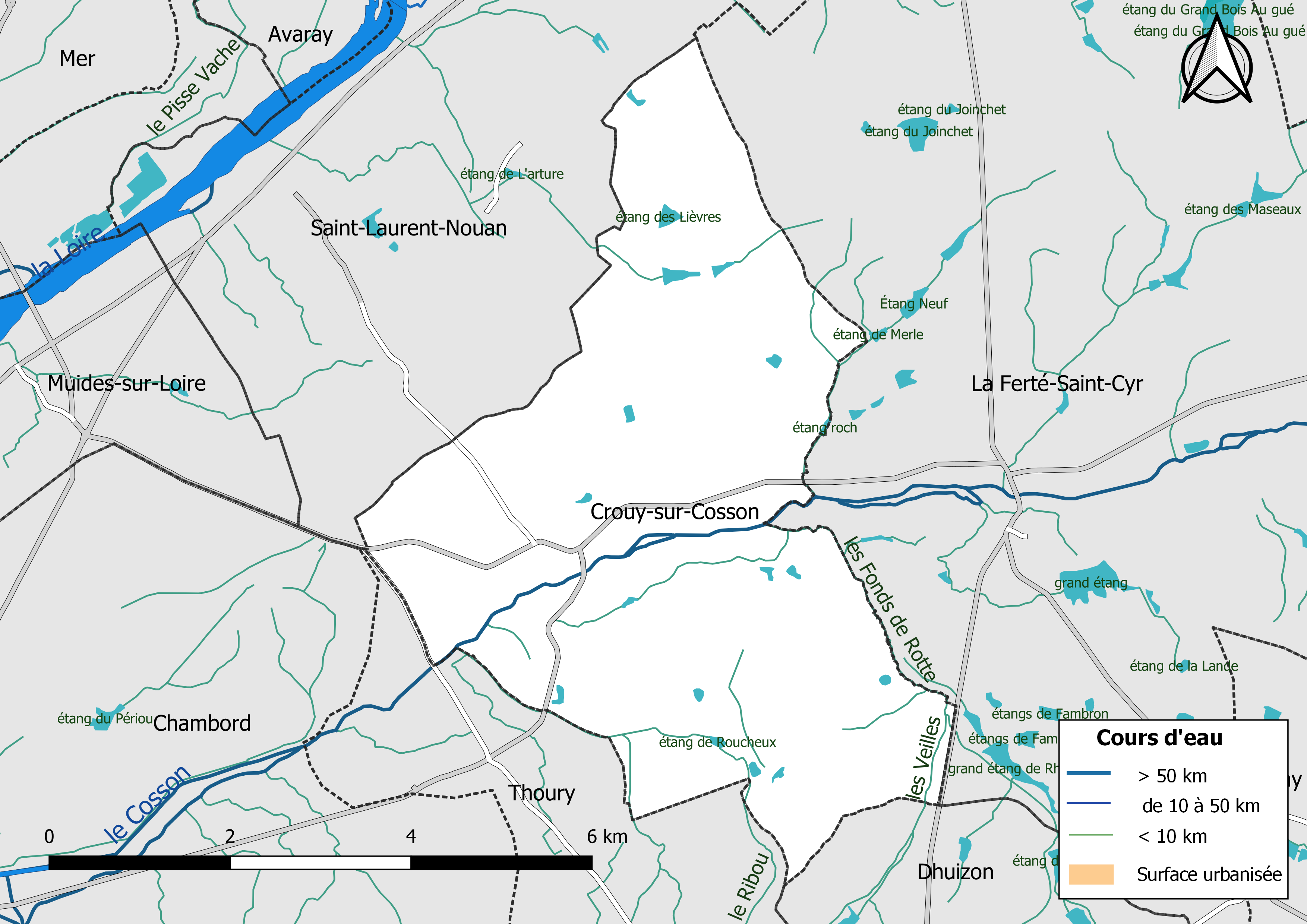 Carte du réseau hydrographique de la commune de Crouy-sur-Cosson (Loir-et-Cher, France).